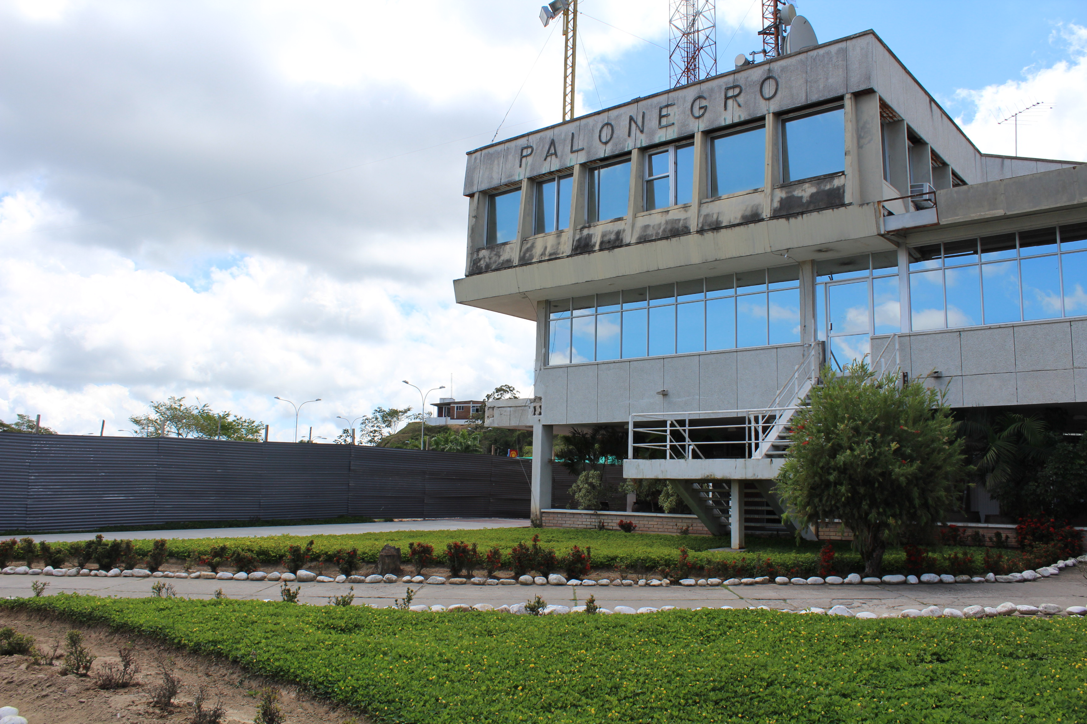 Aeropuerto Palonegro de Bucaramanga